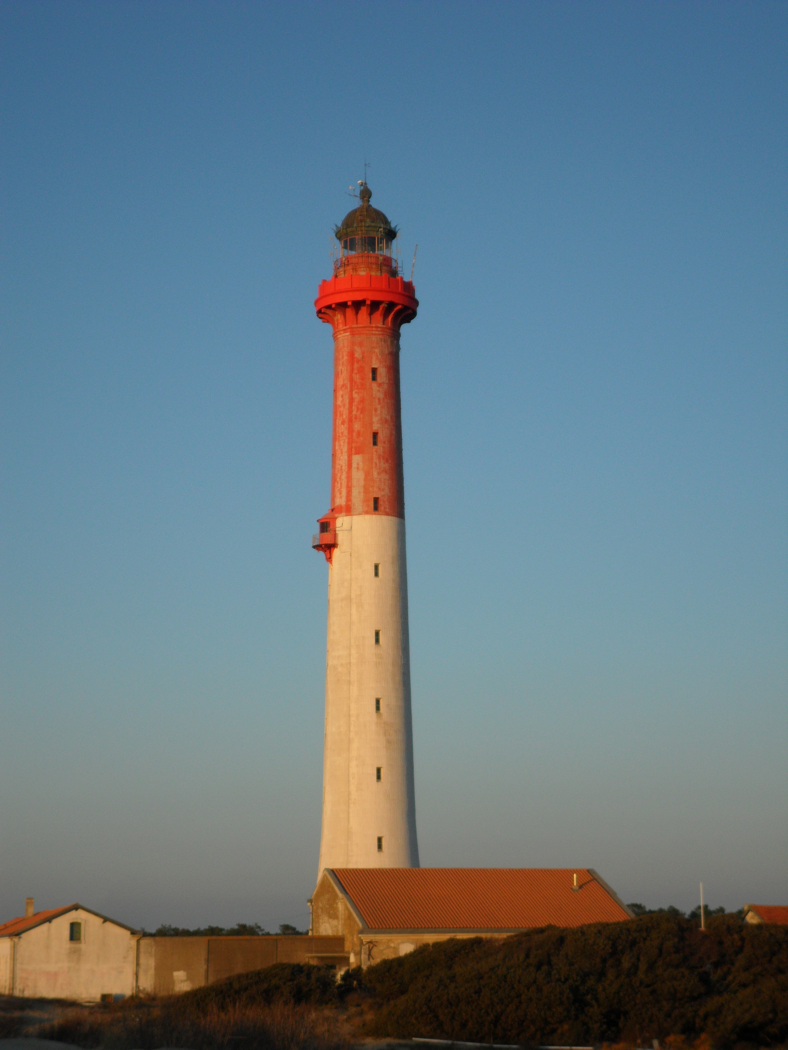 Phare de la pointe de la Coubre